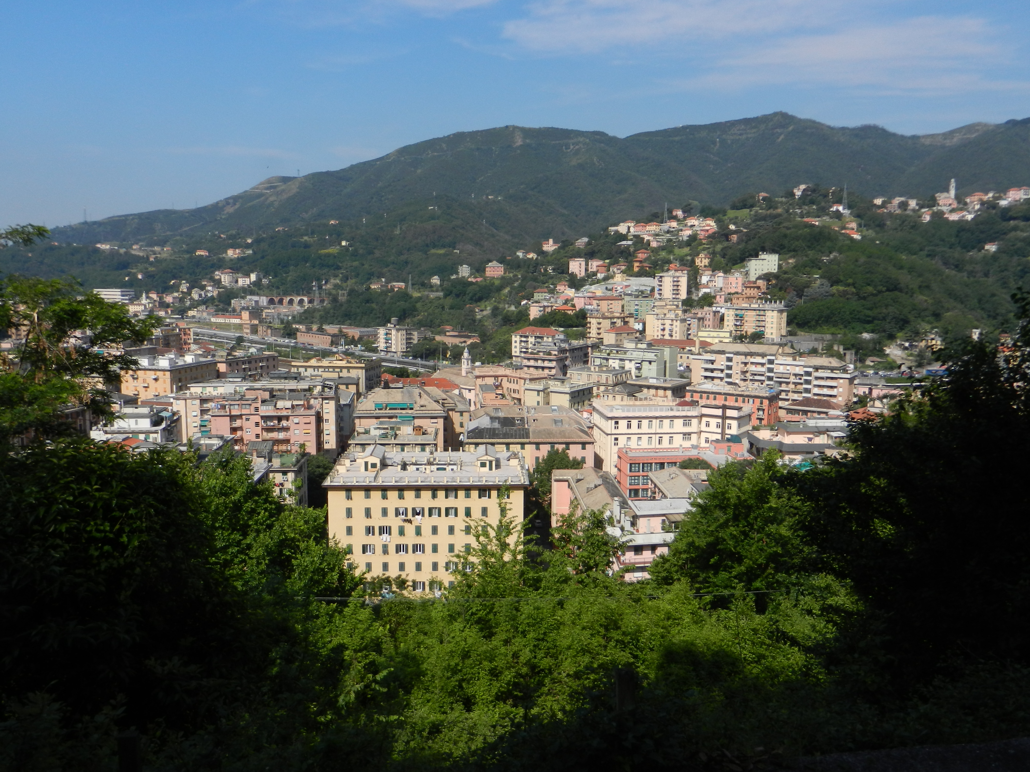 Genova, veduta di Bolzaneto dalla collina di Brasile